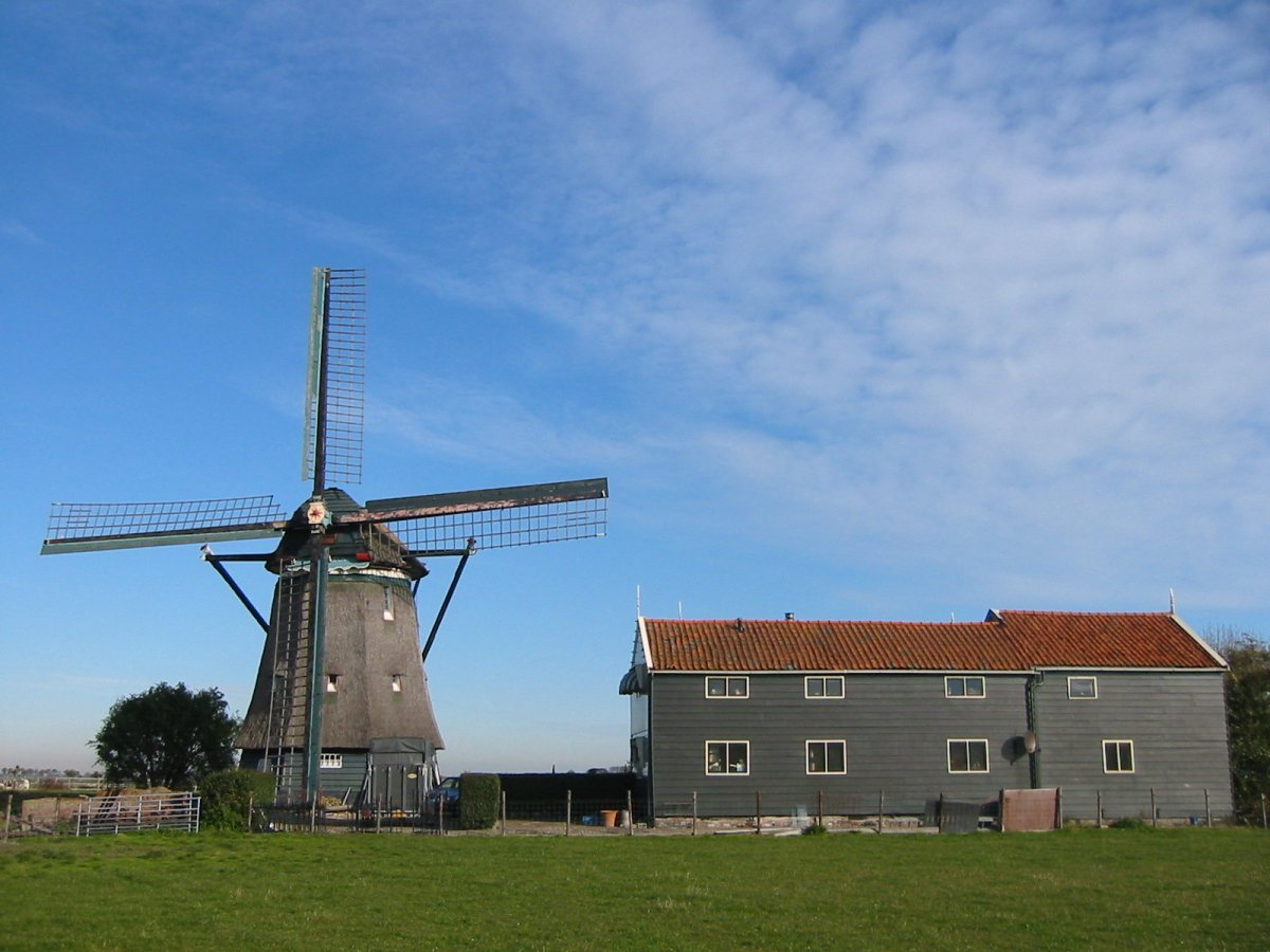 De Nachtegaal/ Ten-Bruggencatenummer: 12226: Achtkante grondzeiler van voren gefotografeerd (opmerking: Foto gemaakt in het kader van het project Actualisering Monumentenregister (AMR).)